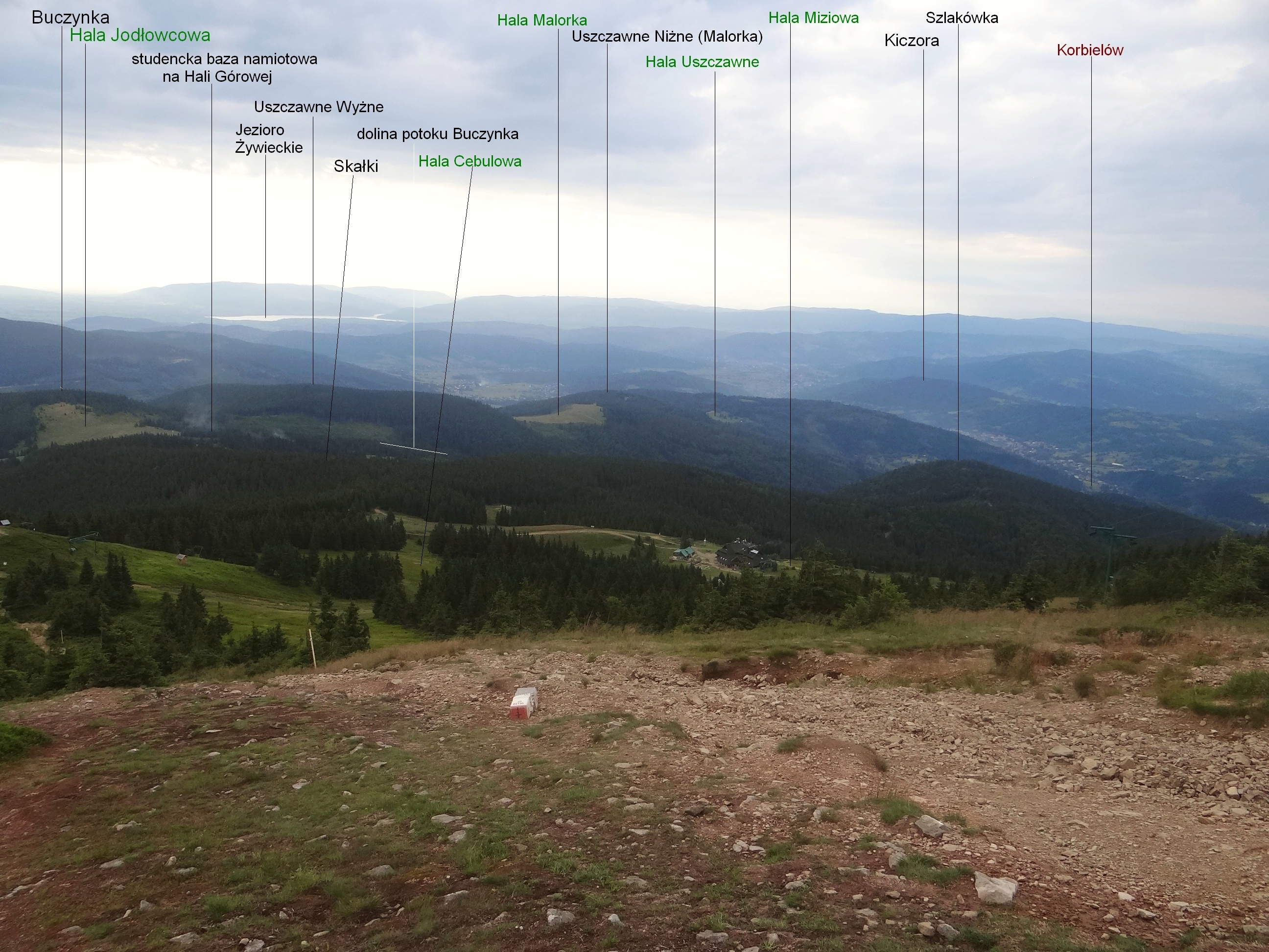 Widok z Kopca na grzbiet i stoki Pilska